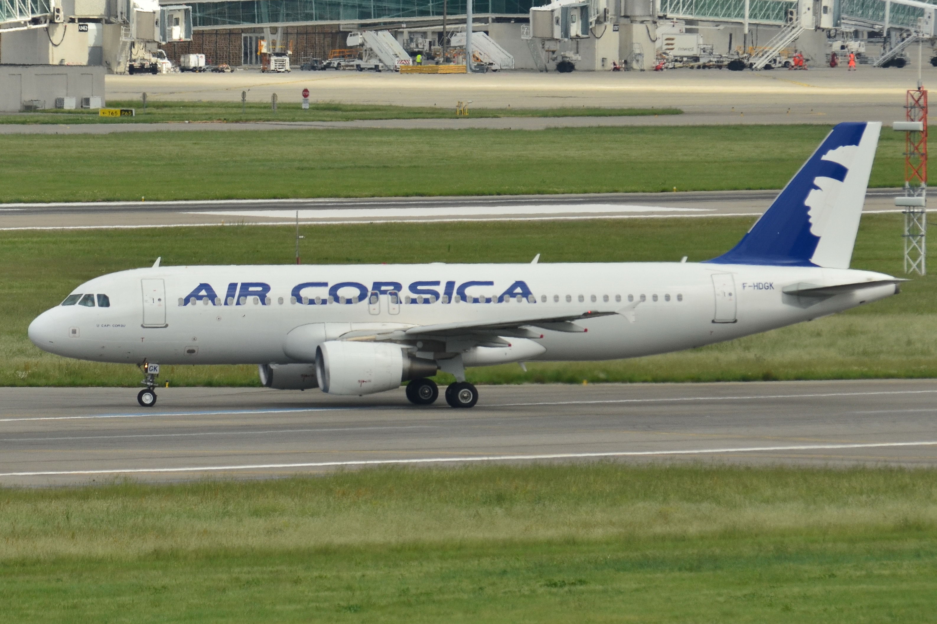 Photo prise à l'aéroport de Toulouse-Blagnac (LFBO) en France. Picture take at Toulouse-Blagnac Airport (LFBO) in France.